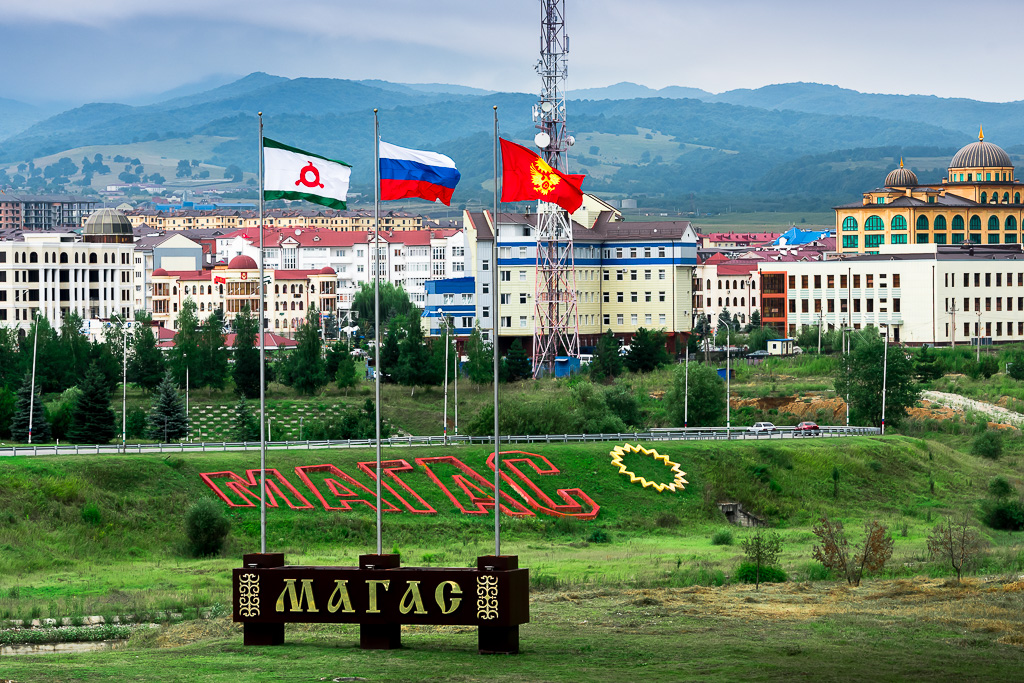 Магас - столица Ингушетии